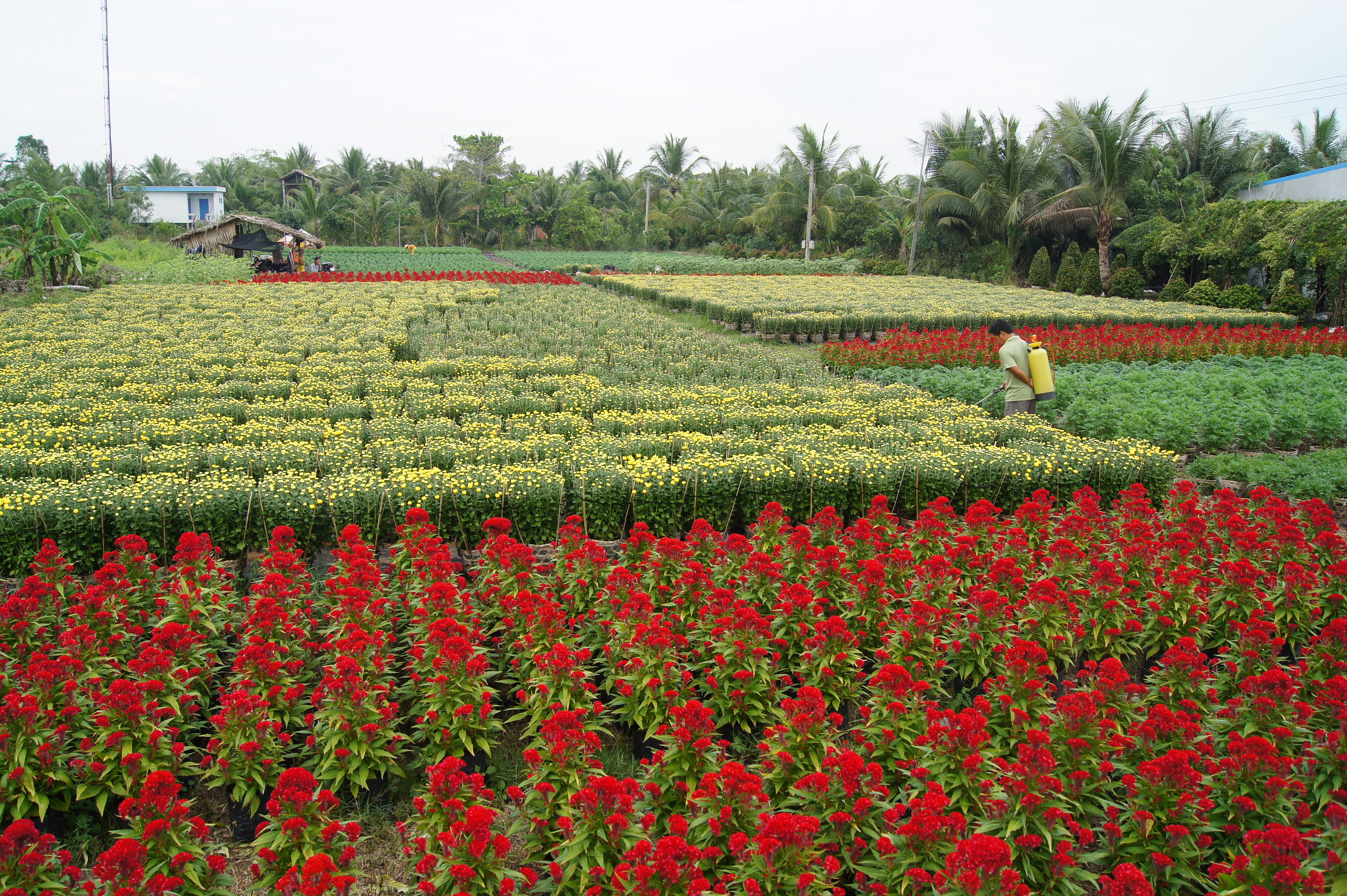 Một vườn hoa ở Chợ Lách, Bến Tre